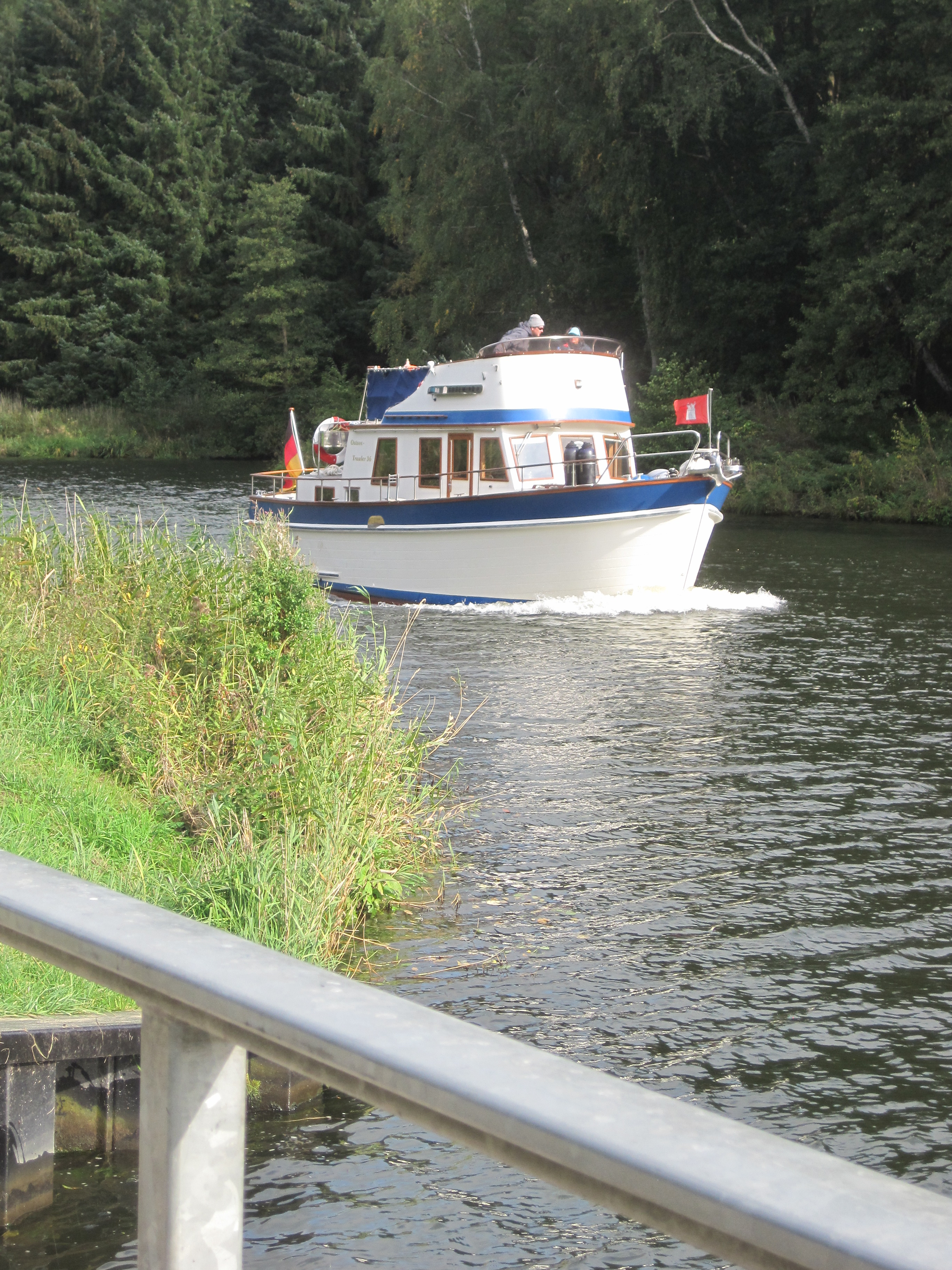 Motoryacht auf dem Elbe-Lübeck-Kanal vor der Mündung der Steinau